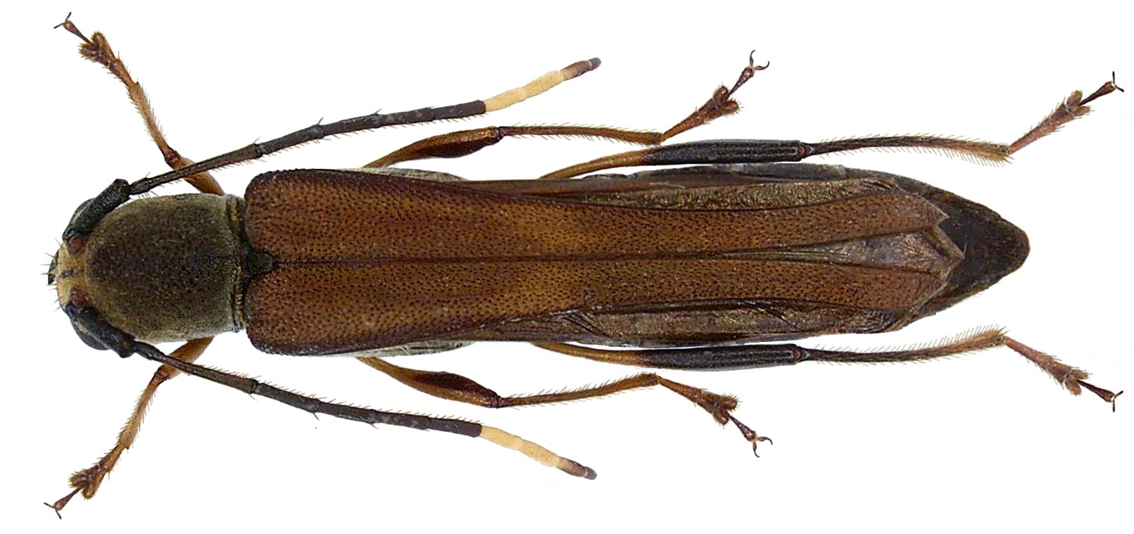 Familie: Cerambycidae Groesse. 23 mm Fundort: Malaysia, Borneo, Sabah, Trus Madi leg. W.T.W.Meng; det. A.Skale Photo: U.Schmidt, 2006